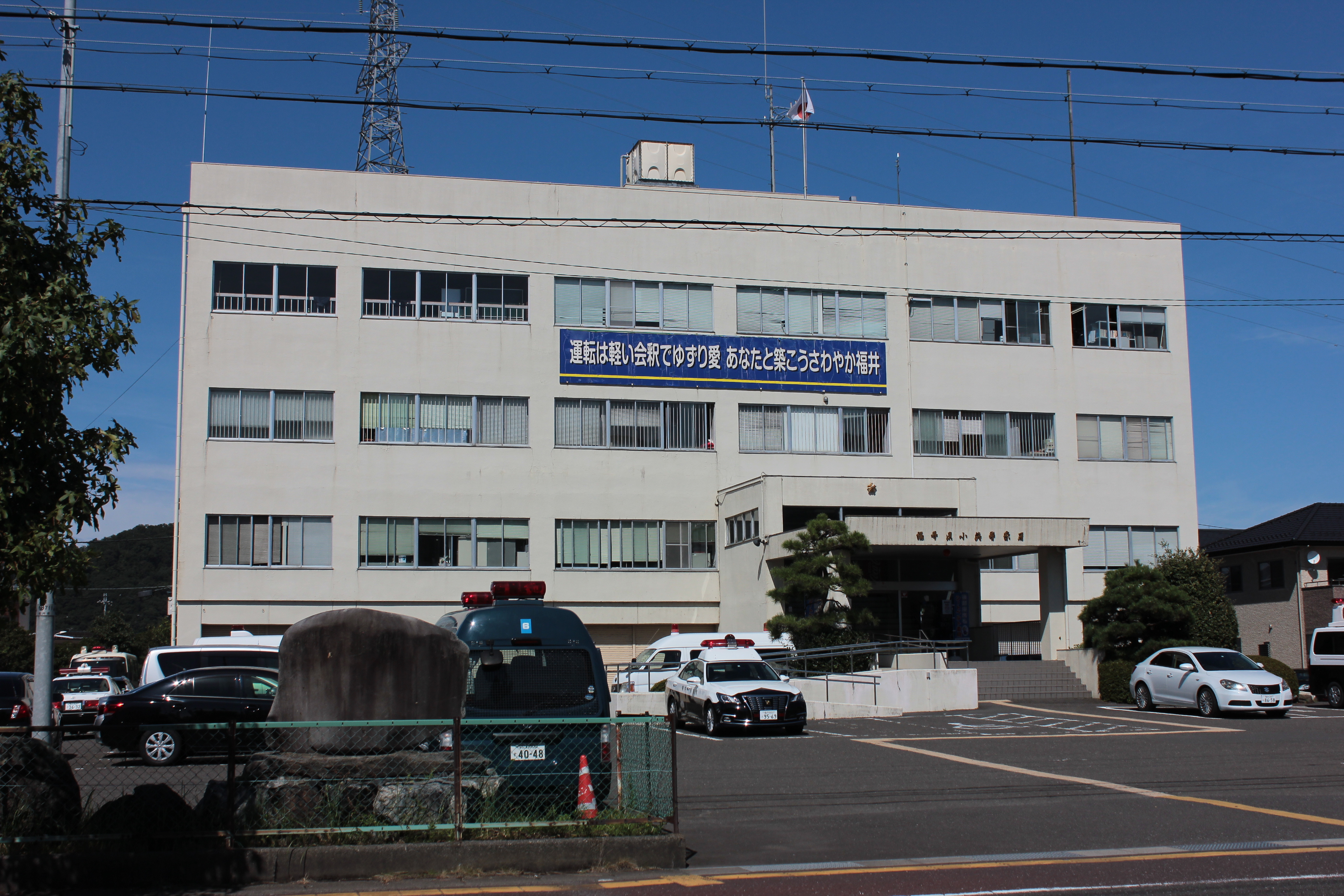 小浜警察署（福井県小浜市） Canon EOS Kiss X5